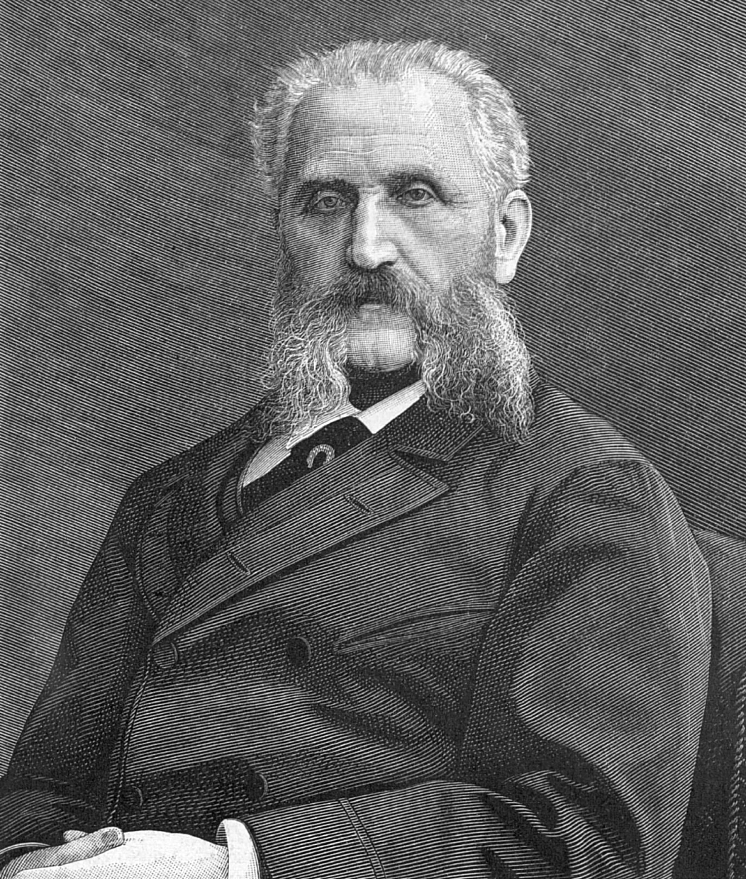 Нарышкин Эммануил Дмитриевич, русский чиновник, землевладелец и благотворитель